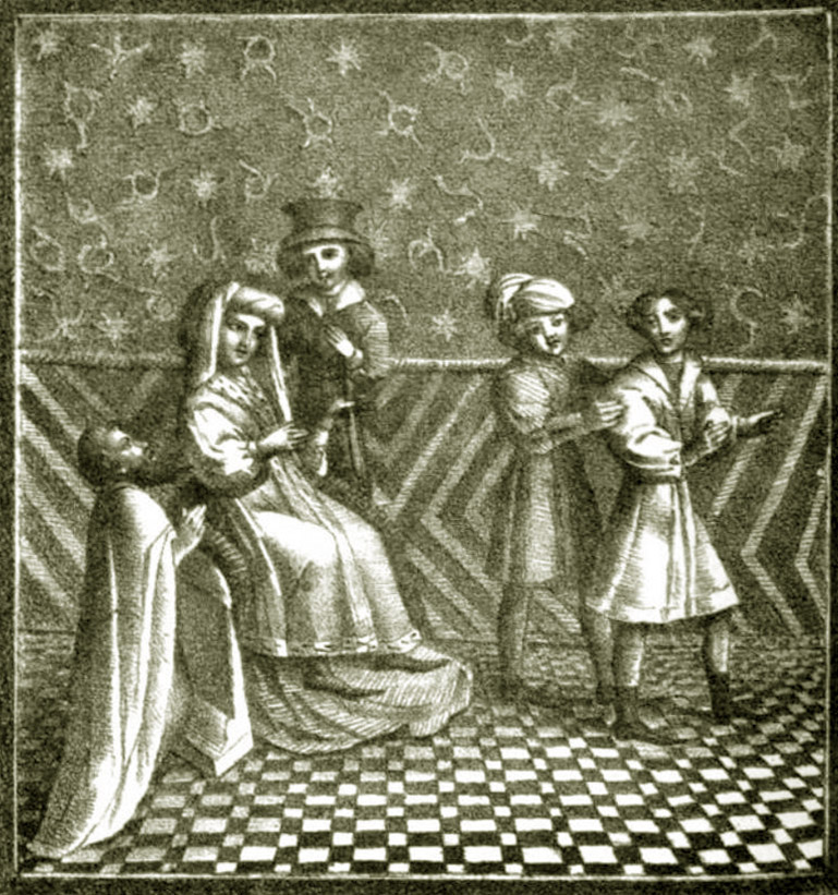 Image (lithographie du 19ème siècle) légendée : Belinus (Belin) et Brennius (ou Brennus) (Brenne), princes anglais (qui deviendront rois) sont réconciliés par leur mère. . Cette lithographie (de G. Eng...), illustre l' un des ouvrage du Marquis de Fortia, "Histoire de Hainaut, par Jacques de Guyse traduite en Français avec le texte latin en regard, et accompagnement de note", publié pour la première fois sur deux manustricts de la Bibliothèque du Ro, à Paris chez A. Sautelet et Cie, Libraires, A Bruxelles, Chez Arnold Lacrosse, imprimeur-Libraire, M DCC XXVI (Tome second 2) (exemplaire scanné par google à la New york public Library qui l'a reçu en 1906). Ce Tome II reprend le livre II et III de J de Guyse, présentant l'histoire du Hainaut telle que rapportée par les chroniqueurs médiévaux, à partir de l'an 775 avant notre ère jusqu'à la desgruction de Carthage, en 146 avant notre ère, soit 629 ans d'histoire (false « Histoire de Hainaut, par Jacques de Guyse »)Unknown picture named : belinus (belin) and brennius (brenne), english princes are reconciled by their mother